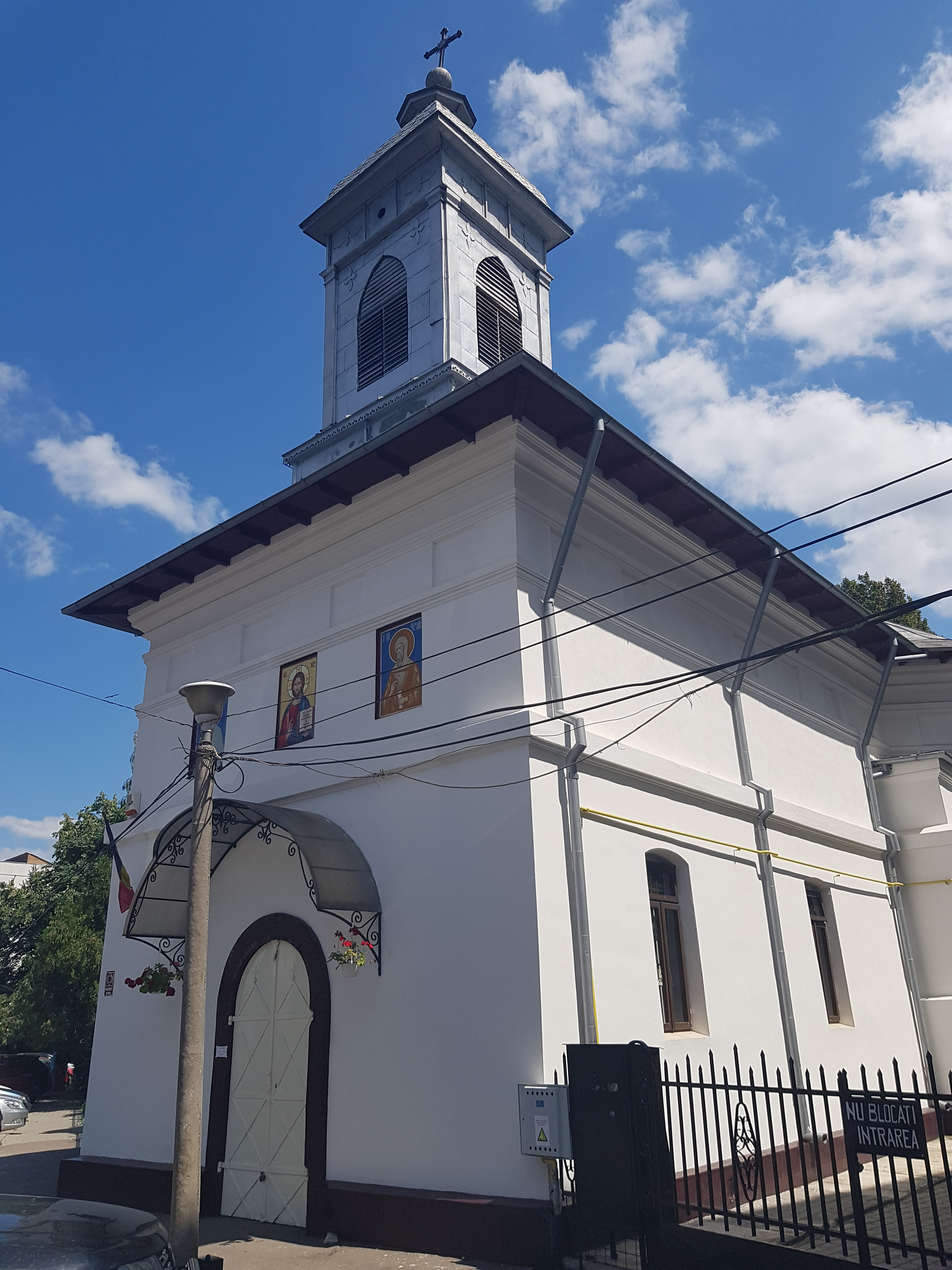 Biserica „Sf. Dumitru”